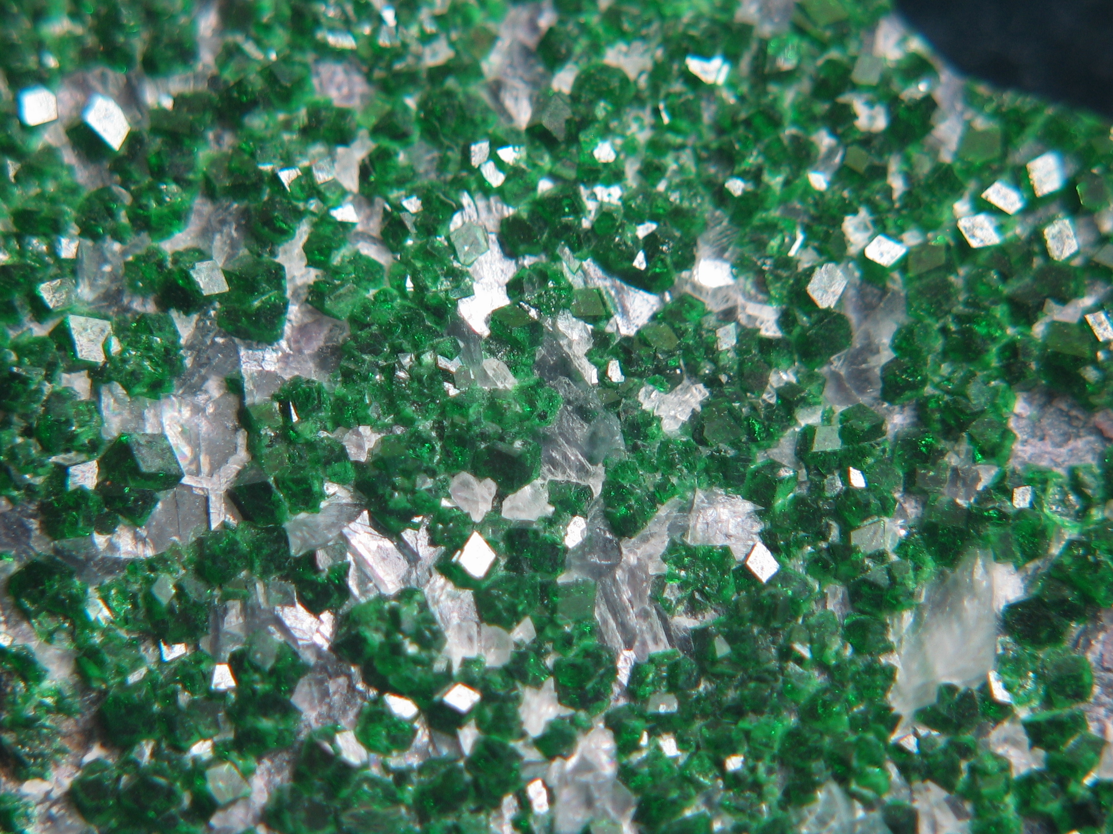 Granat (uwarowit) - Saranowskiy Mine, Ural